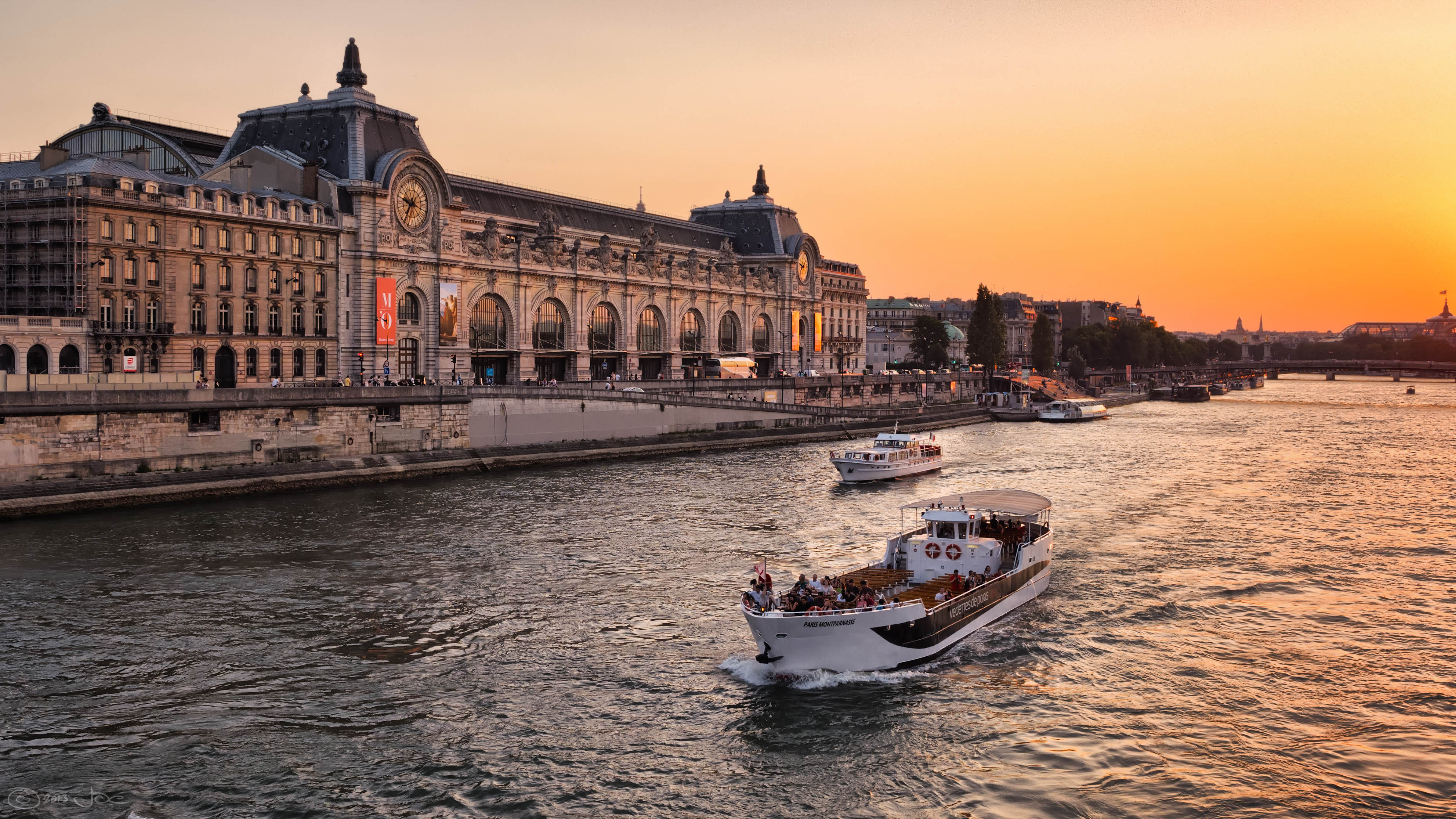 The Musée d'Orsay at sunset, Paris.